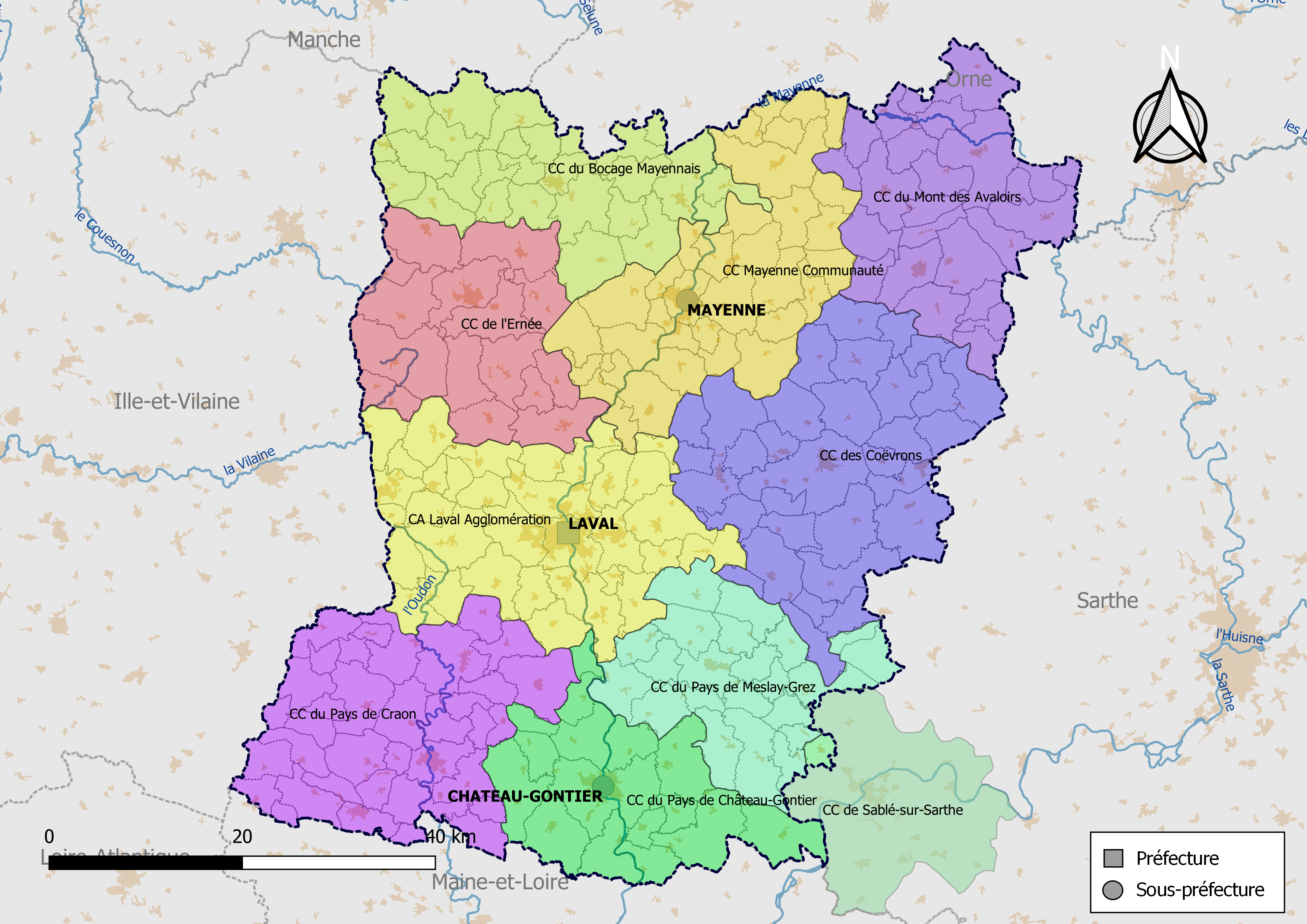 Carte des intercommunalités du département de la Mayenne, France. Composition au 1er janvier 2019.